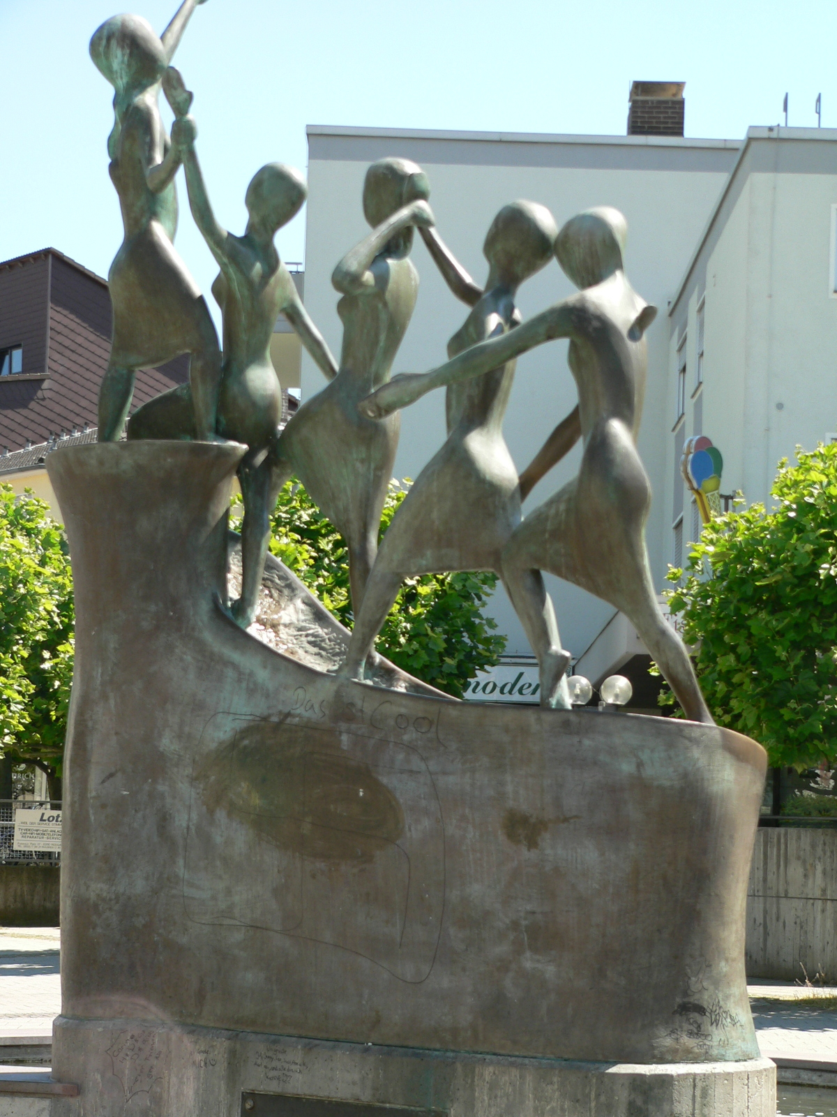 "Brunnen der Jugend" in Rodgau – Nieder-Roden Fotograf: presse03, selbst fotografiert 2005 Lizenz: GNU-FDL Kategorie:Bild:Brunnen Contents 1 Weitere Bilder und Beschreibungen in der folgenden Galerie: 1.1 Brunnen 1.2 Skulpturen 2 Licensing 3 Original upload log Weitere Bilder und Beschreibungen in der folgenden Galerie: Brunnen Drachenbrunnen am Wasserturm St.-Rochus-Brunnen in Hainhausen Der "Gugi-Brunnen" vor dem Rathaus Dorfbrunnen in Nieder-Roden "Brunnen der Jugend" auf dem Puiseauxplatz Dorfbrunnen in Dudenhofen Vier-Röhren-Brunnen vor dem Bürgerhaus Dudenhofen Ziehbrunnen mit Krone in Dudenhofen Brunnen-Ensemble am Ludwig-Erhard-Platz Brunnen vor dem Haus der Begegnung, Jügesheim Sprudelstein vor dem Standesamt Skulpturen Jerusalem-Stele in Jügesheim Edelstahl-Feder in Nieder-Roden Ludwig-Erhard-Büste in Dudenhofen Kreuzgruppe in Dudenhofen Giebelkreuz an St. Nikolaus, Jügesheim "Gänsehirt" in Dudenhofen "Gänsehirt" Detail in Dudenhofen "Gänsehirt" Detail in Dudenhofen "Schäfer" in Dudenhofen Eine von 9 Granit-Skulpturen in der Rodau-Aue in Dudenhofen Eine von 9 Granit-Skulpturen in der Rodau-Aue in Dudenhofen Eine von 9 Granit-Skulpturen in der Rodau-Aue in Dudenhofen Eine von 9 Granit-Skulpturen in der Rodau-Aue in Dudenhofen Eine von 9 Granit-Skulpturen in der Rodau-Aue in Dudenhofen Eine von 9 Granit-Skulpturen in der Rodau-Aue in Dudenhofen